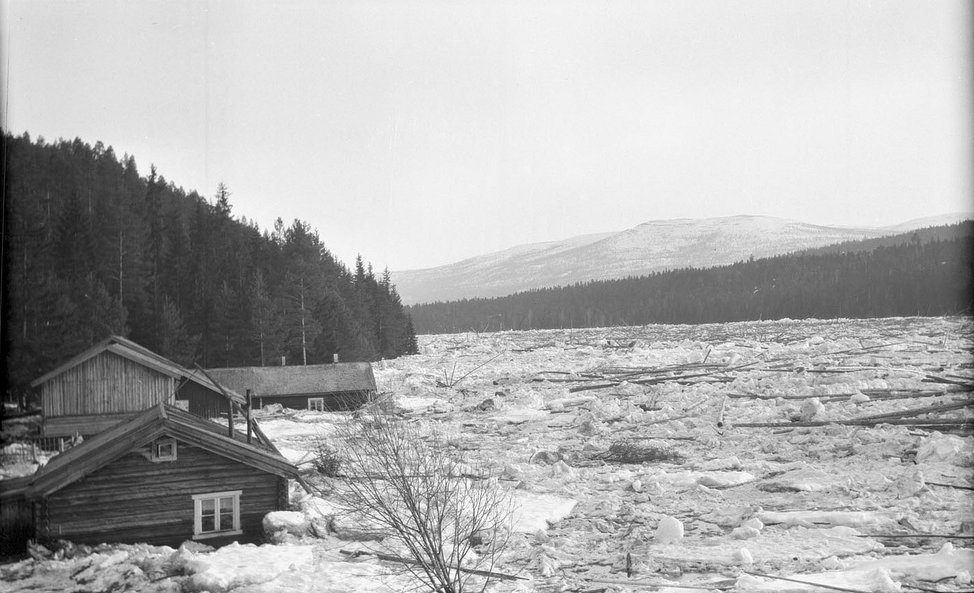 Isgangen i Stor-Elvdal, Viholmen. Hus halveis under is. Vassdragsarkivet. Dato: 29.04.1928